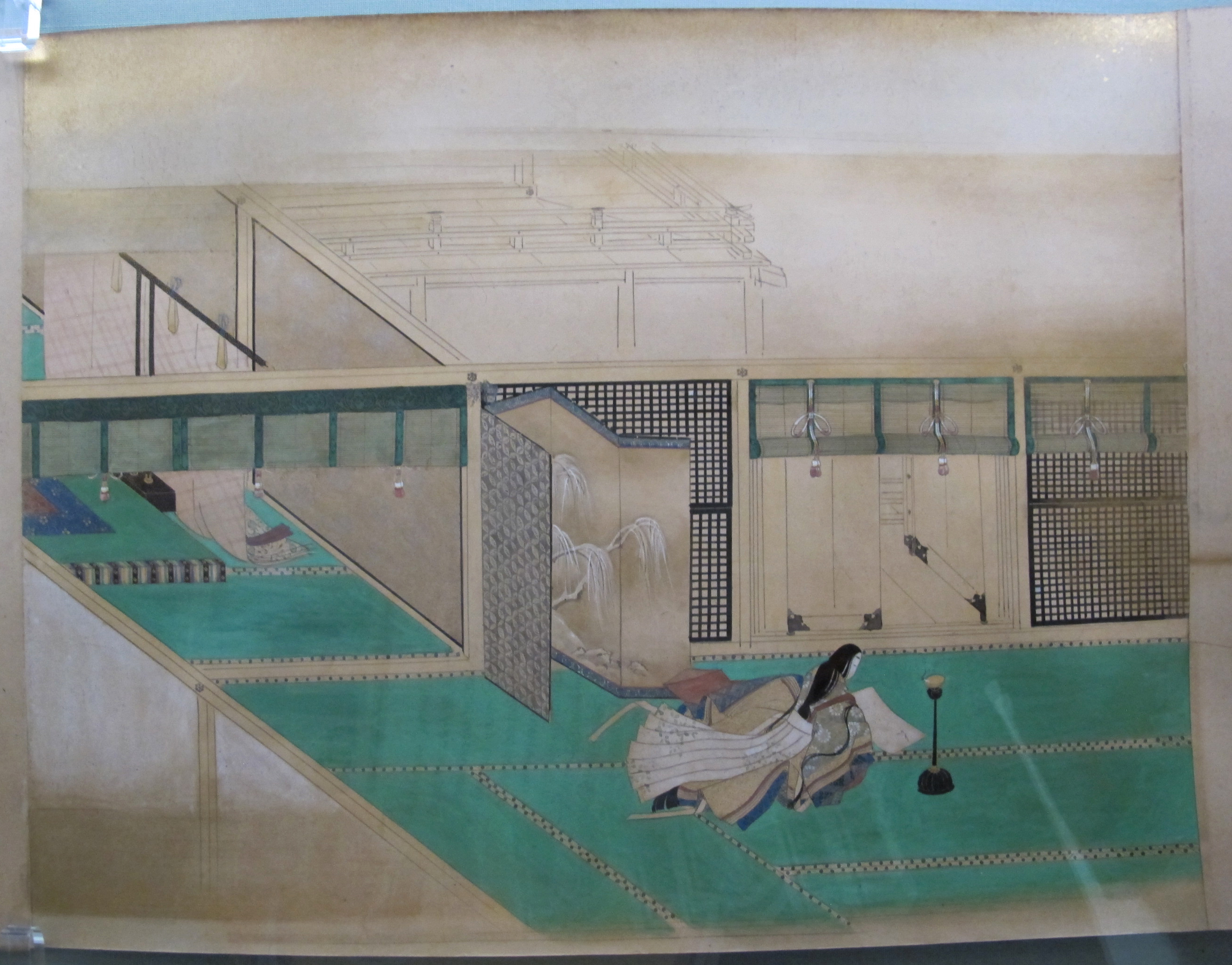 Periodo edo, sumiyoshi jokei, rotolo con il racconto di ise, XVII sec.